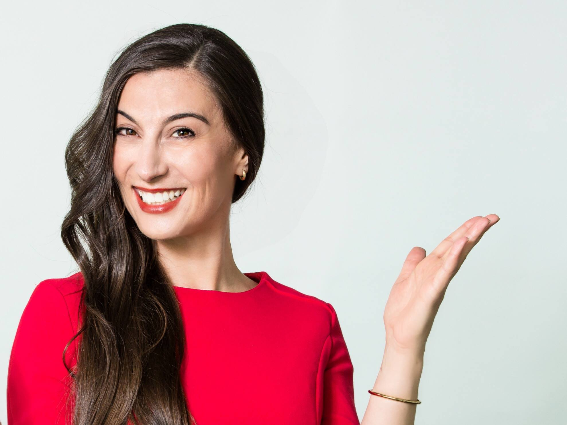 Moderatorin Cécile Ziegler